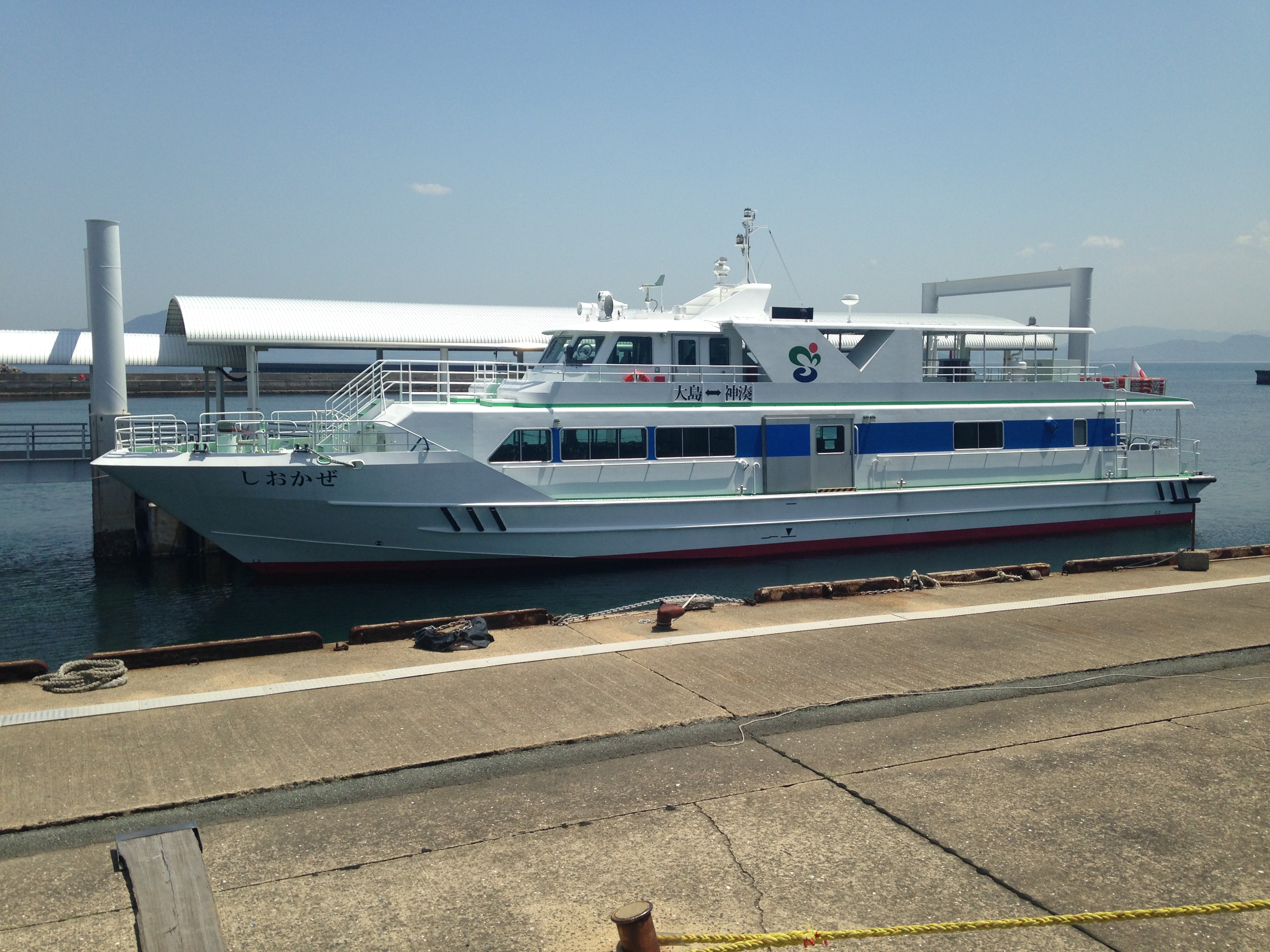 筑前大島・大島港に停泊する「しおかぜ」(「フェリーおおしま」より)